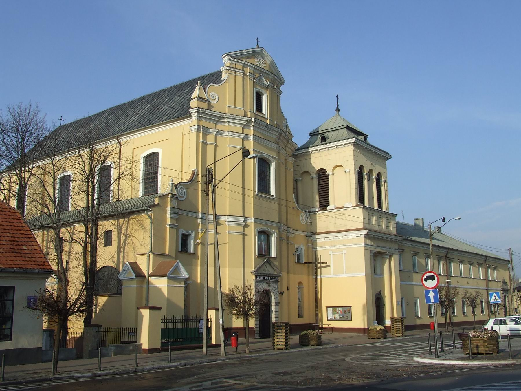 Kościół p.w. Niepokalanego Poczęcią N.M.P, klasztor oo. Jezuitów (1693-1730)